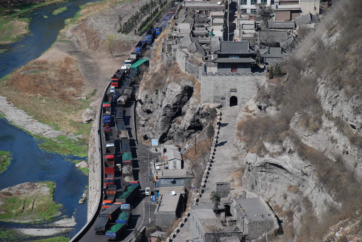 Trucks at Niangziguan